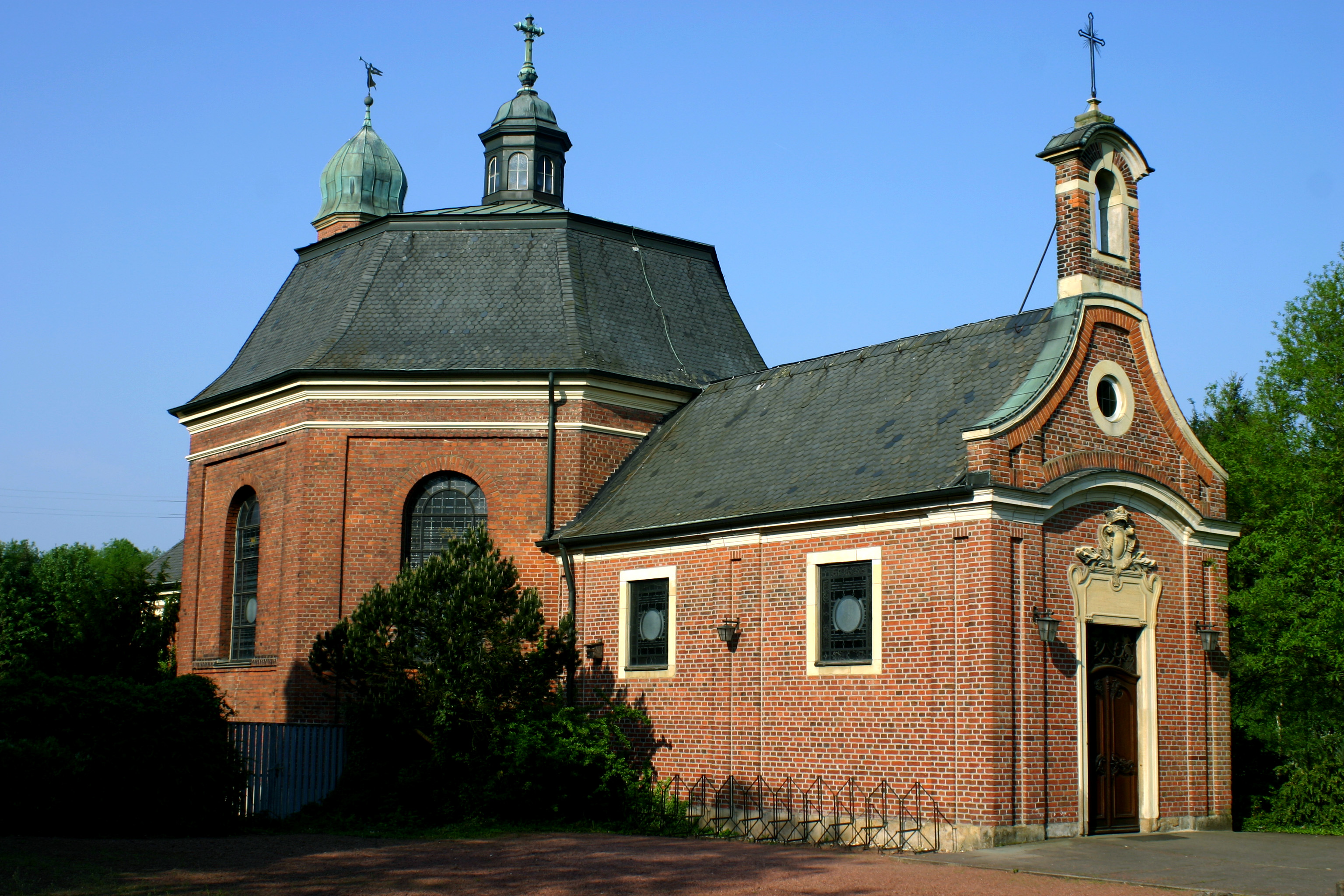 Pfarrkirche der Gemeinde St. Mariä Himmelfahrt, Münster (Dykburg)